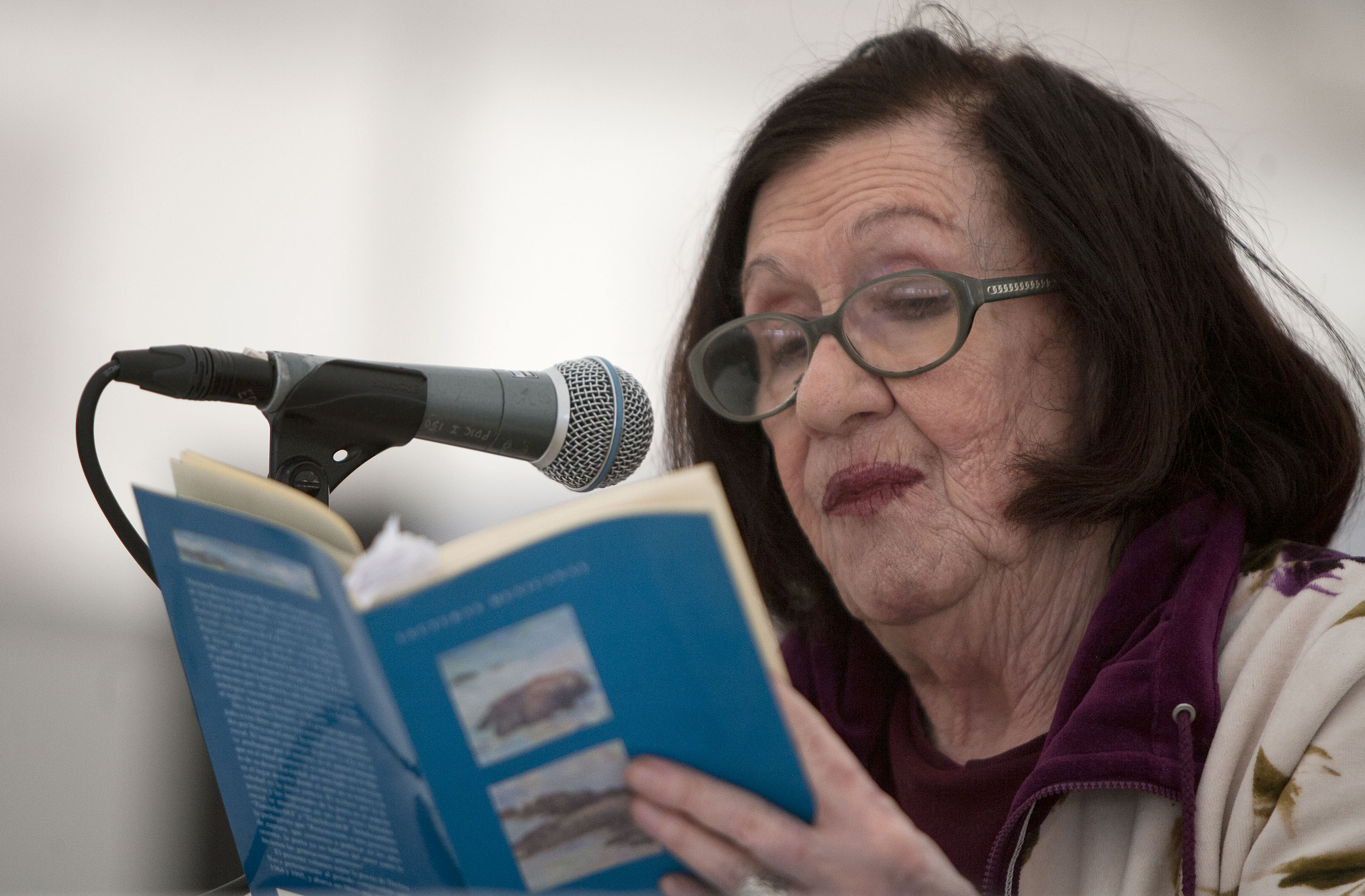 Domingo, 20 de Octubre 2013. Recital de poesía en las voces de Thelma Nava y Enrique González Rojo en la XIII Feria Internacional del Libro del Zócalo de la Ciudad de Mexico. Foto: Octavio Nava/Secretaria de Cultura